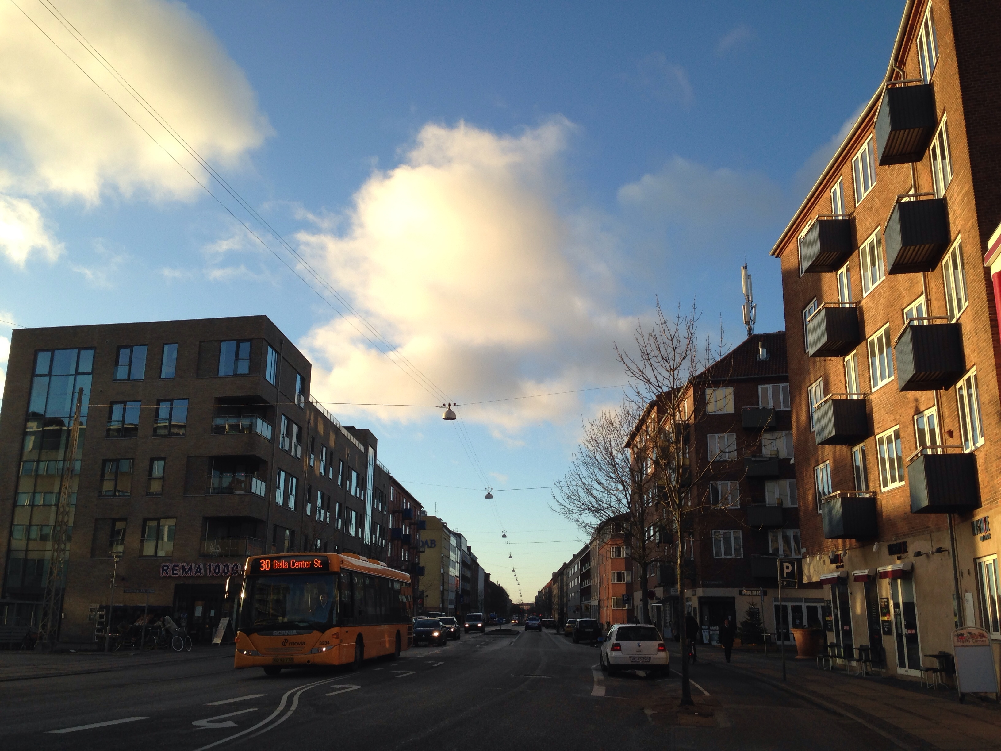 Finsensvej in Frederiksberg, Copenhagen, Denmark